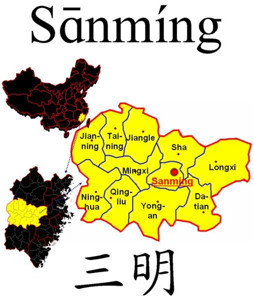 Kreise des Bezirks Sanming (Original text: Kreisebene der Stadt Sanming) Andere Versionen: JPG )